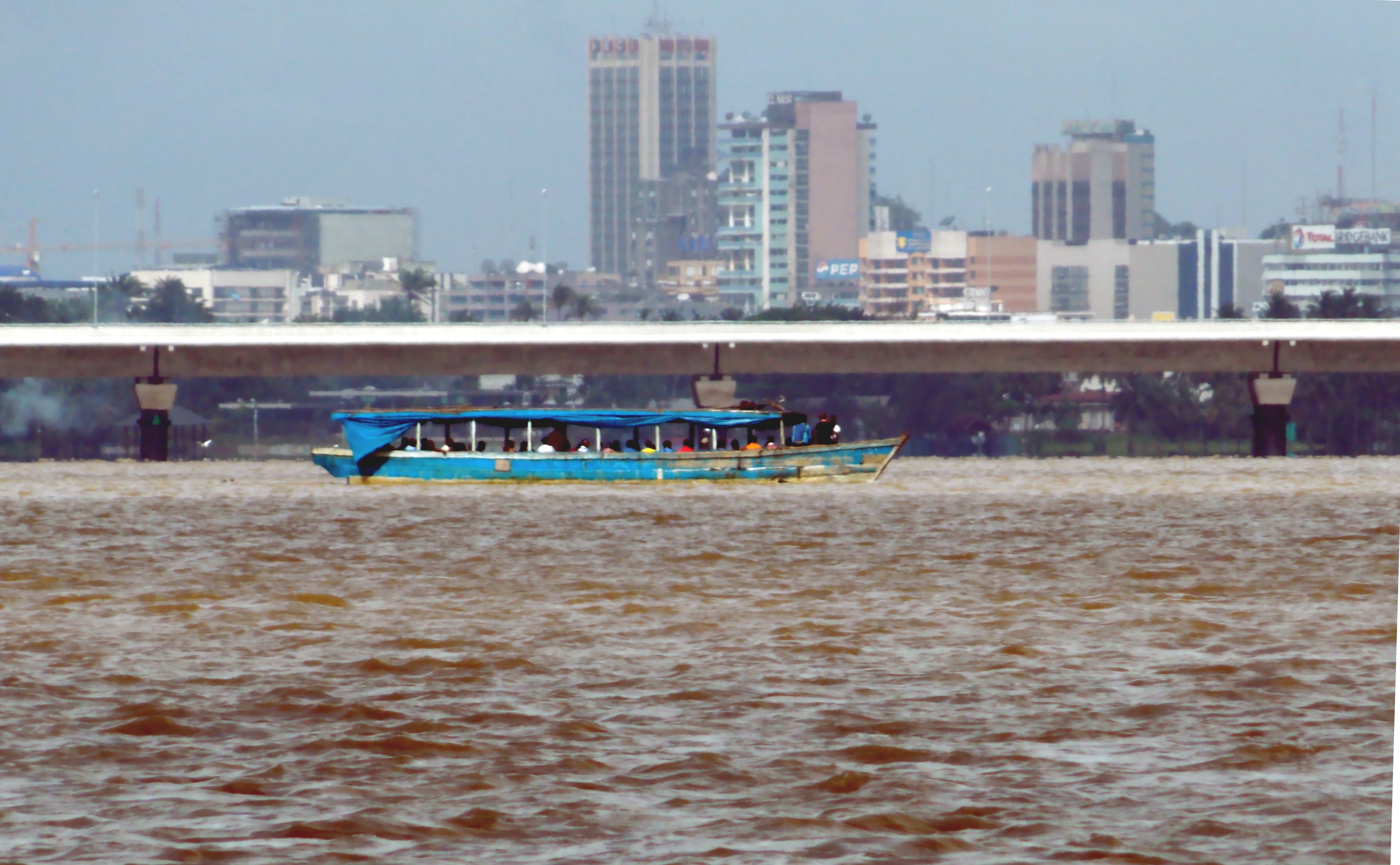 Une pinasse de tourisme devant le pont Henri-Konan-Bédié, à Abidjan.